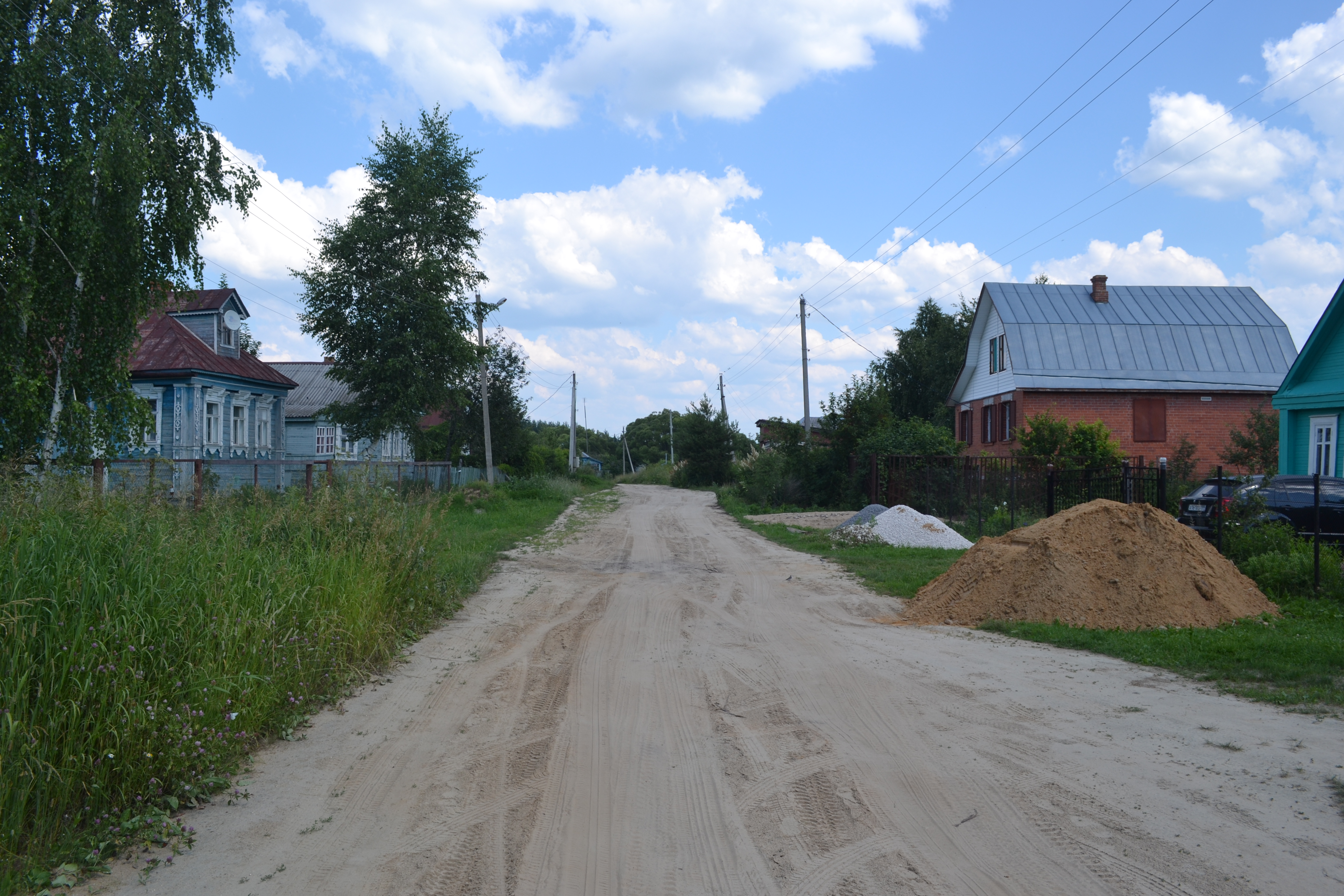 Коренец (Шатурский район)